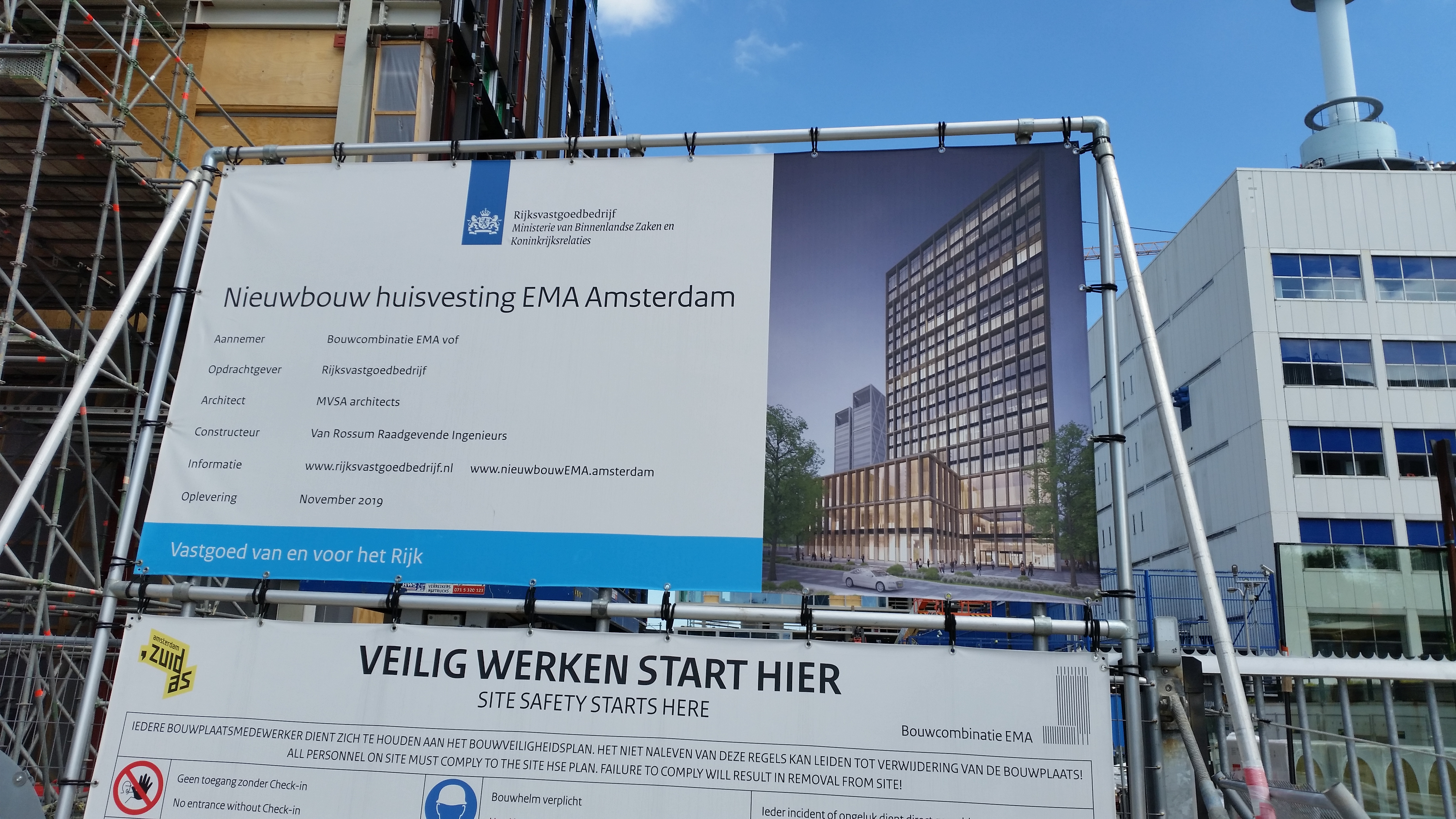 Bord bij Vivaldigebouw (mei 2019)